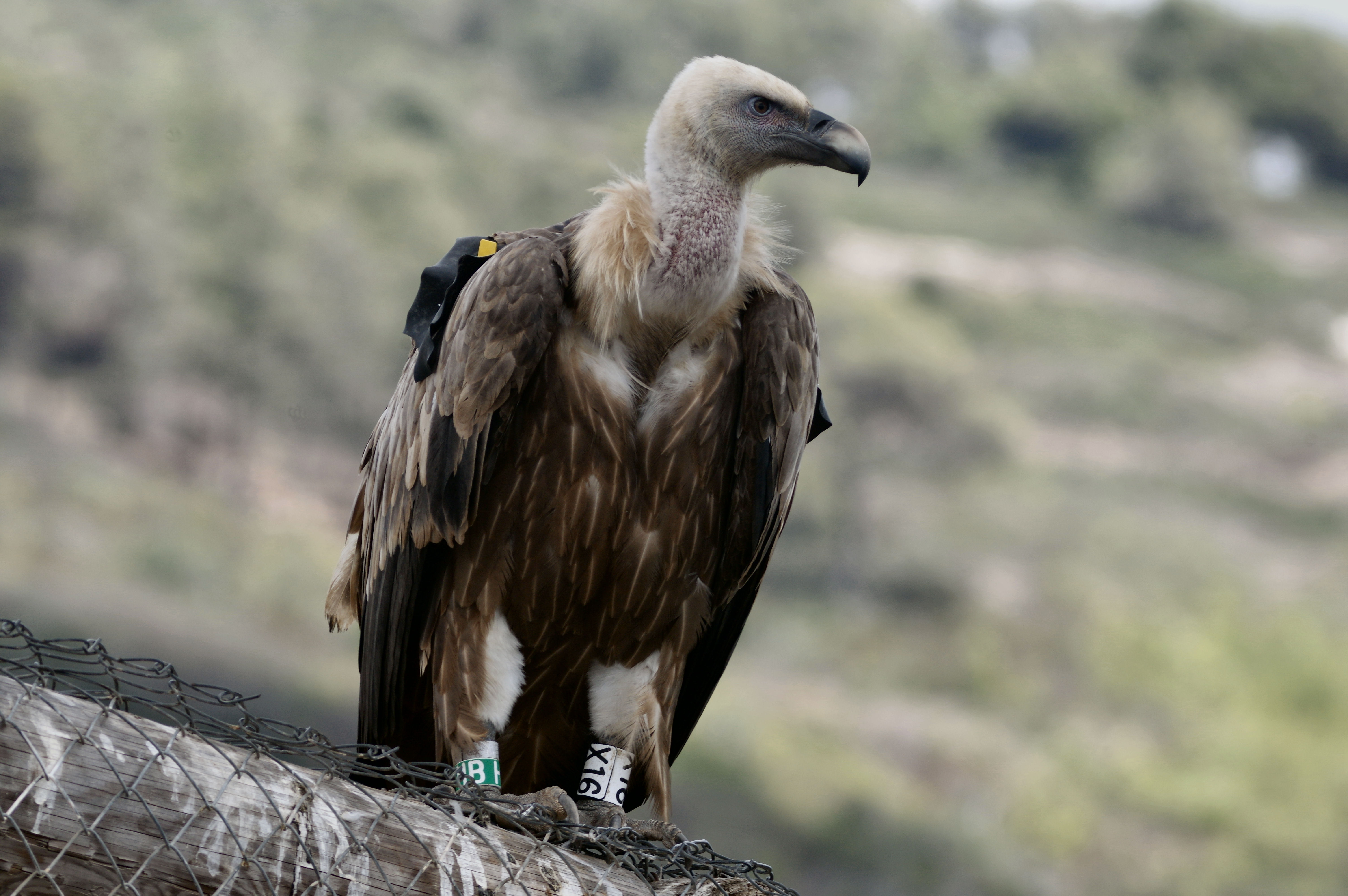 פארק הכרמל הוא כינוי לרצף של גנים לאומיים ושמורות טבע על הר הכרמל הגבוה, המשתרע מגבולותיהן הדרומיים של הערים חיפה ונשר בצפון, ועד אזור נחל מערות ועמק מהר"ל בדרום; שלושה יישובים על רכס הכרמל מהווים מובלעות בתוך רצף שטחי הפארק - עספיא, דלית אל כרמל ובית אורן. גודל הפארק המקורי היה 101,590 דונם, מתוכם 63,950 דונם שהוגדרו כ-"גן לאומי" ו-37,640 דונם הוגדרו כ"שמורת טבע". שטח השמורות משולב בתוך פארק הכרמל כאשר שטחי הגן הלאומי מקיפים את השמורות ויוצרים רצף של שטחים ירוקים.